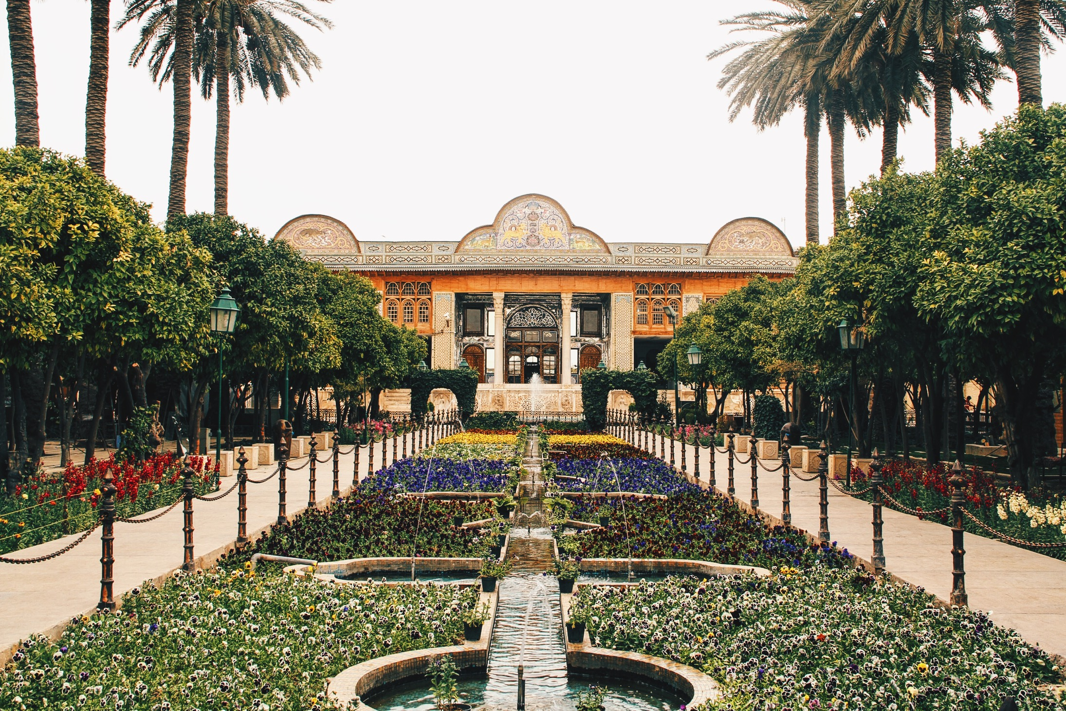 نارجستان قوام 1